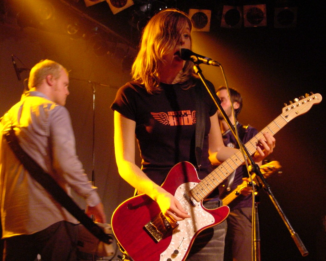 Wir sind Helden in der Alten Feuerwache in Mannheim